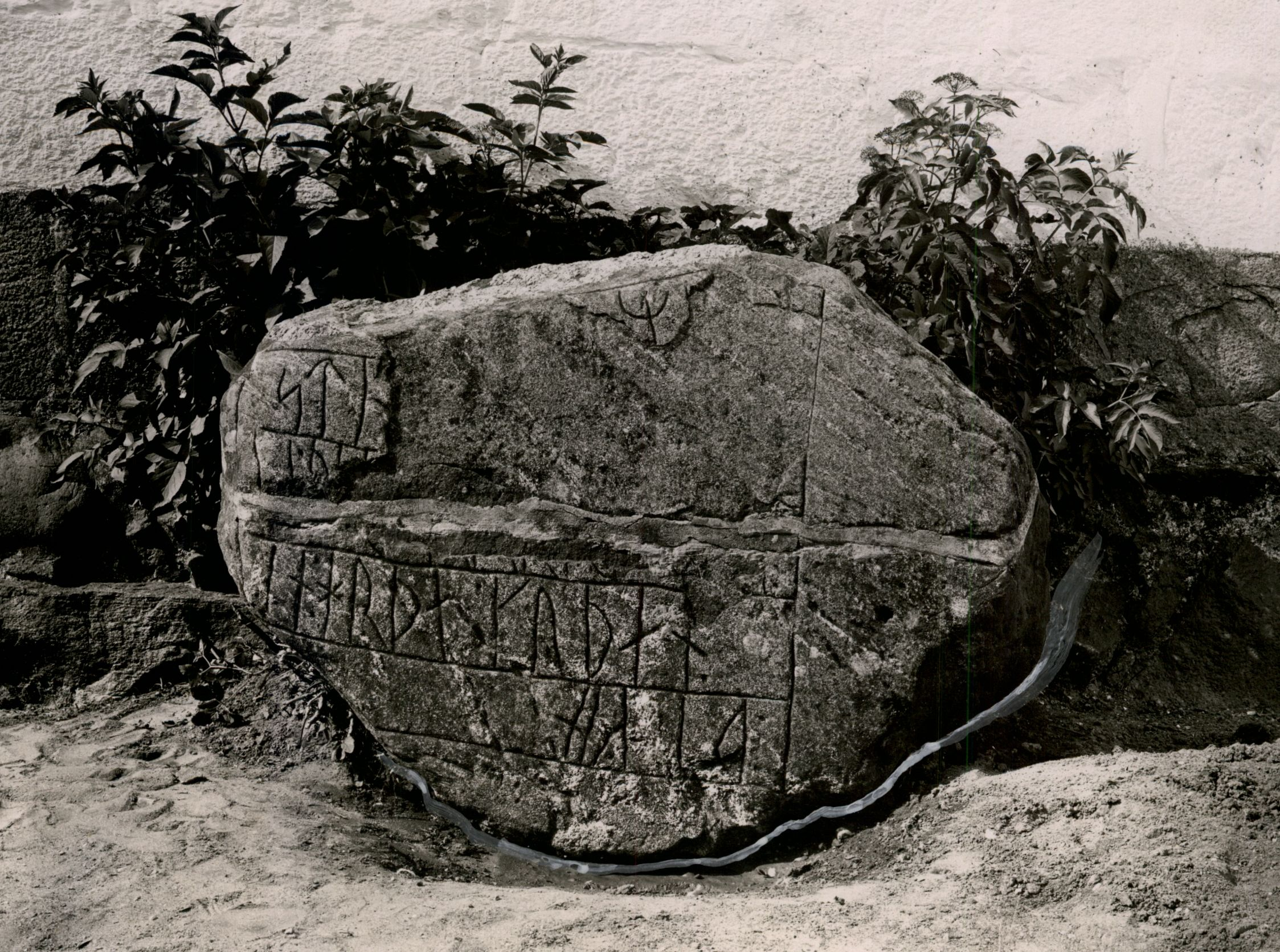 Langå-sten IV (Langå-sten 3) Langå. Runesten.